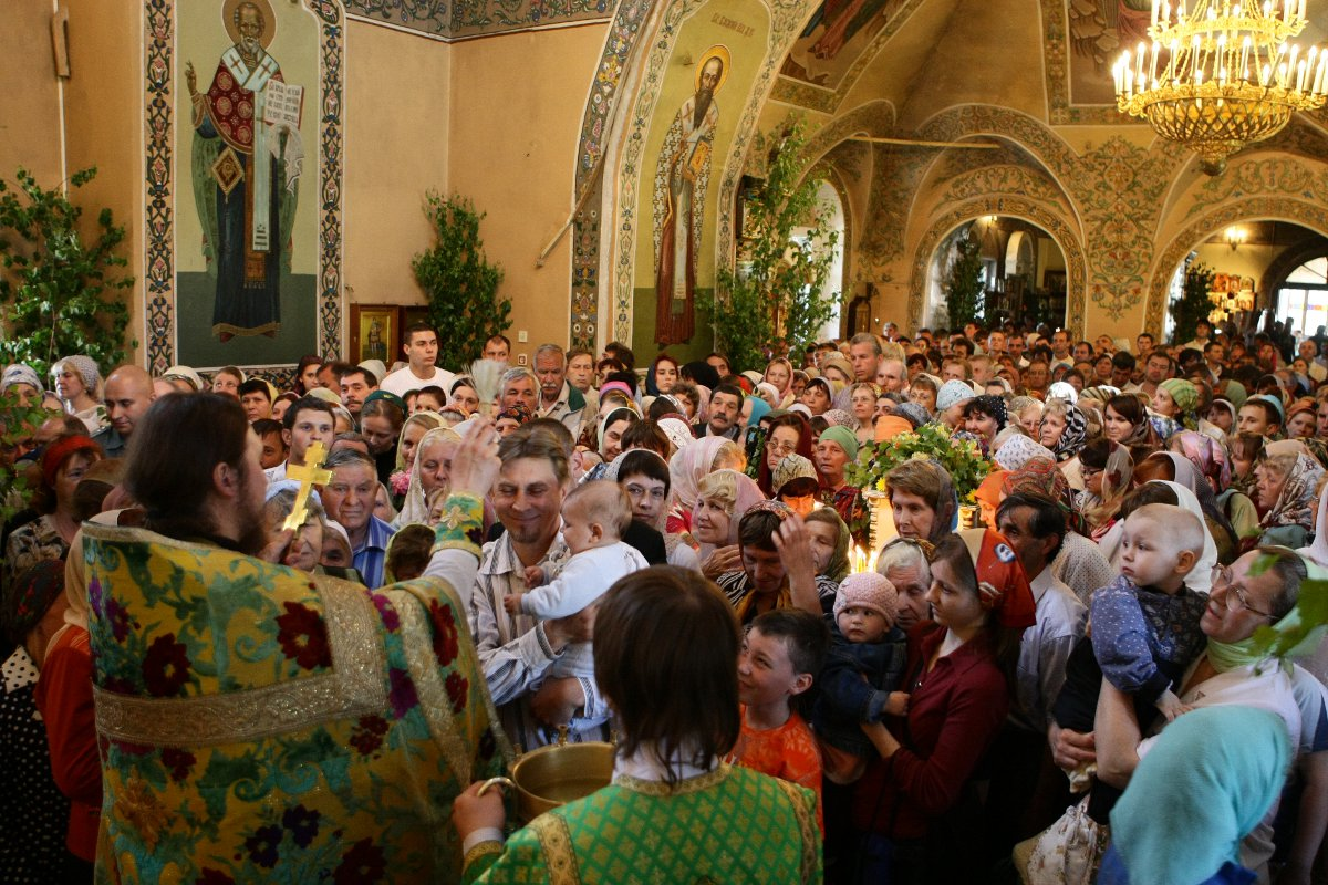 День Святой Троицы. Престольный праздник